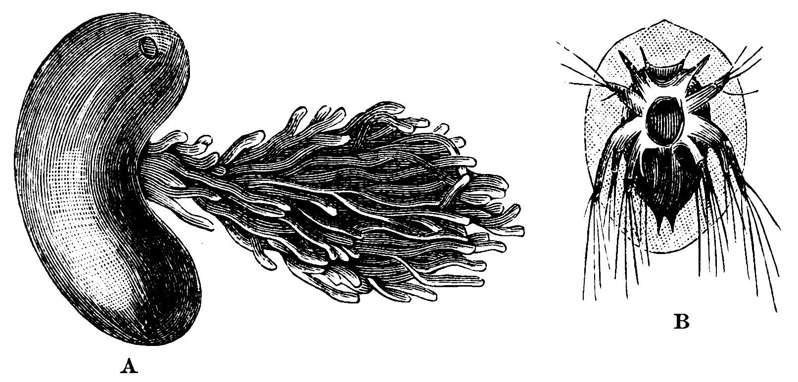 Sacculina and young